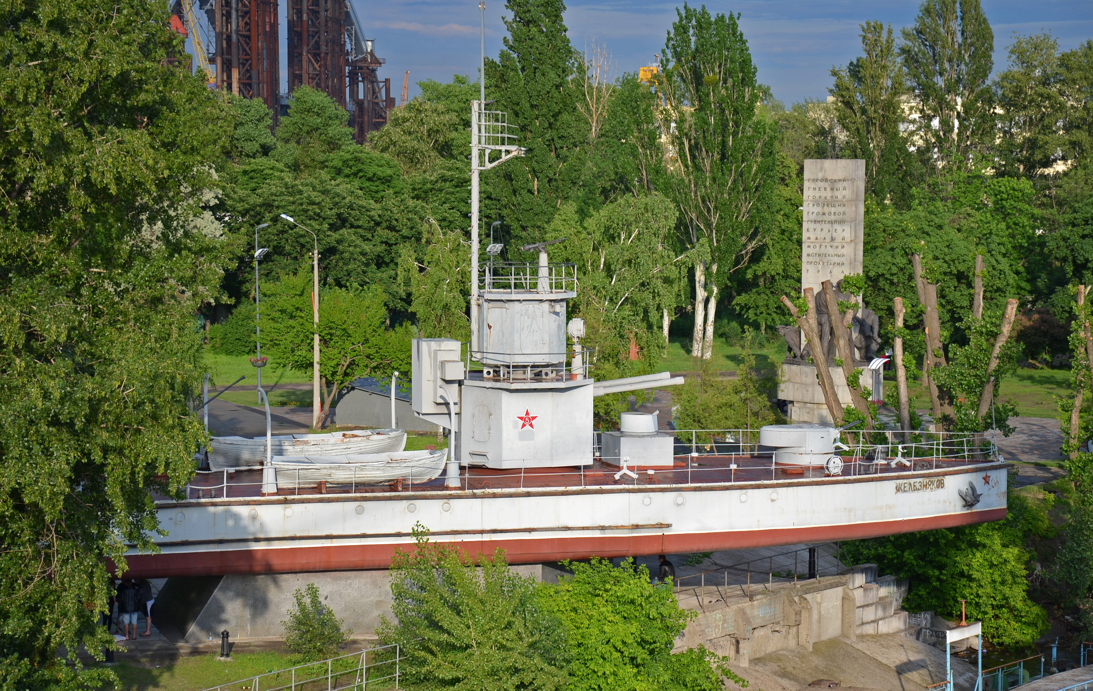 Пам'ятник екіпажу монітора «Железняков», який виявив легендарні приклади військової звитяги у боротьбі з фашизмом в роки Великої Вітчизняної війни, Київ, Електриків вул., 26